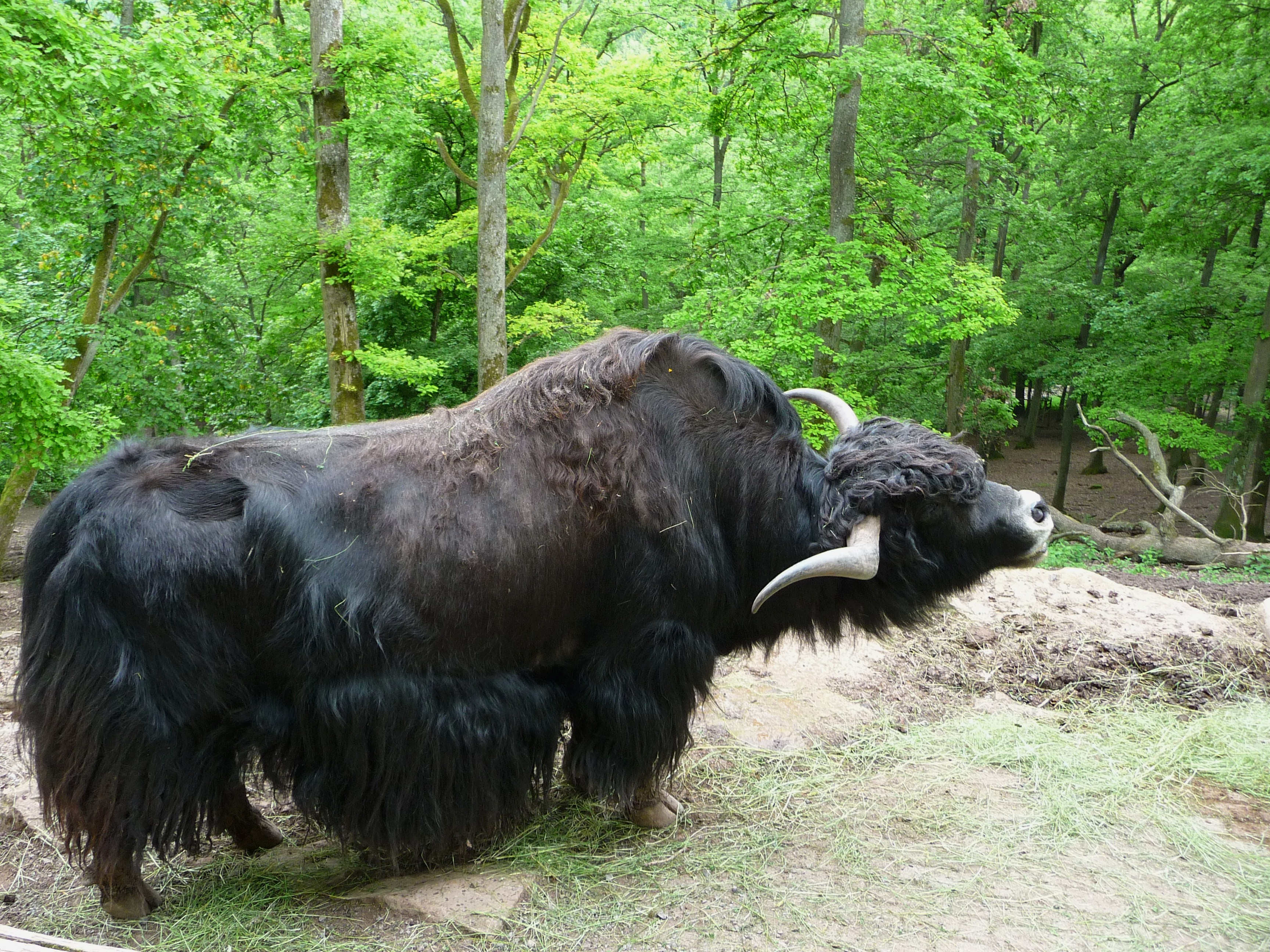 Yak-Bulle (Bos mutus), fotografiert im Wildpark Tripsdrill (Baden-Württemberg, Deutschland)